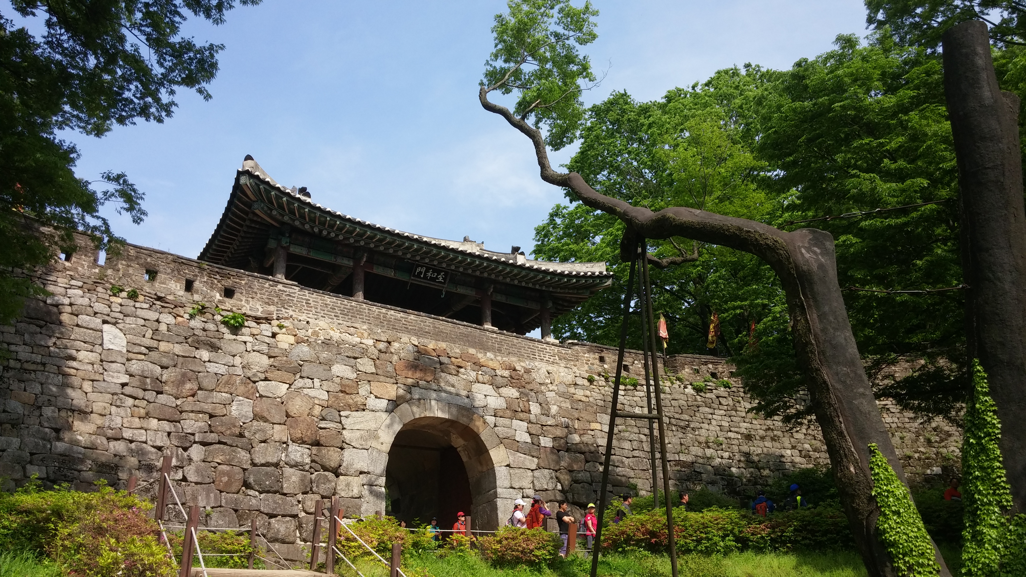 남한산성 남문